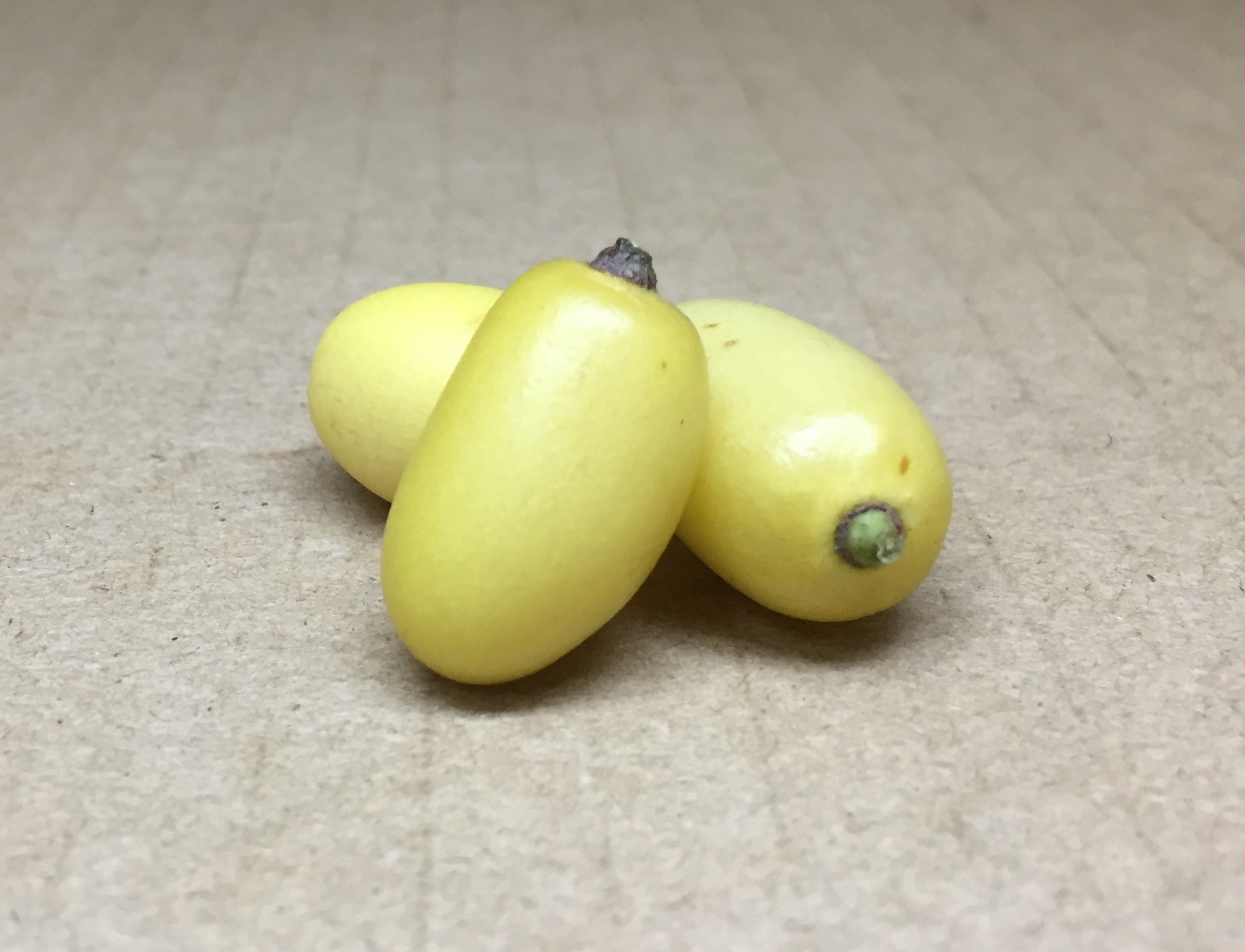 fruits à maturité du margousier